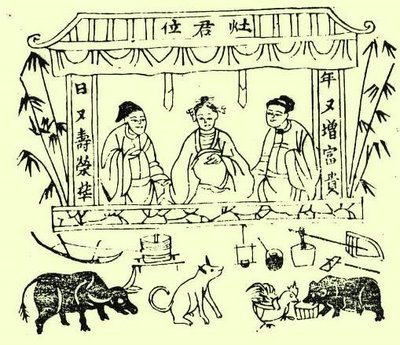 中文（香港）: 越南灶君畫 Táo quân (Kitchengod)